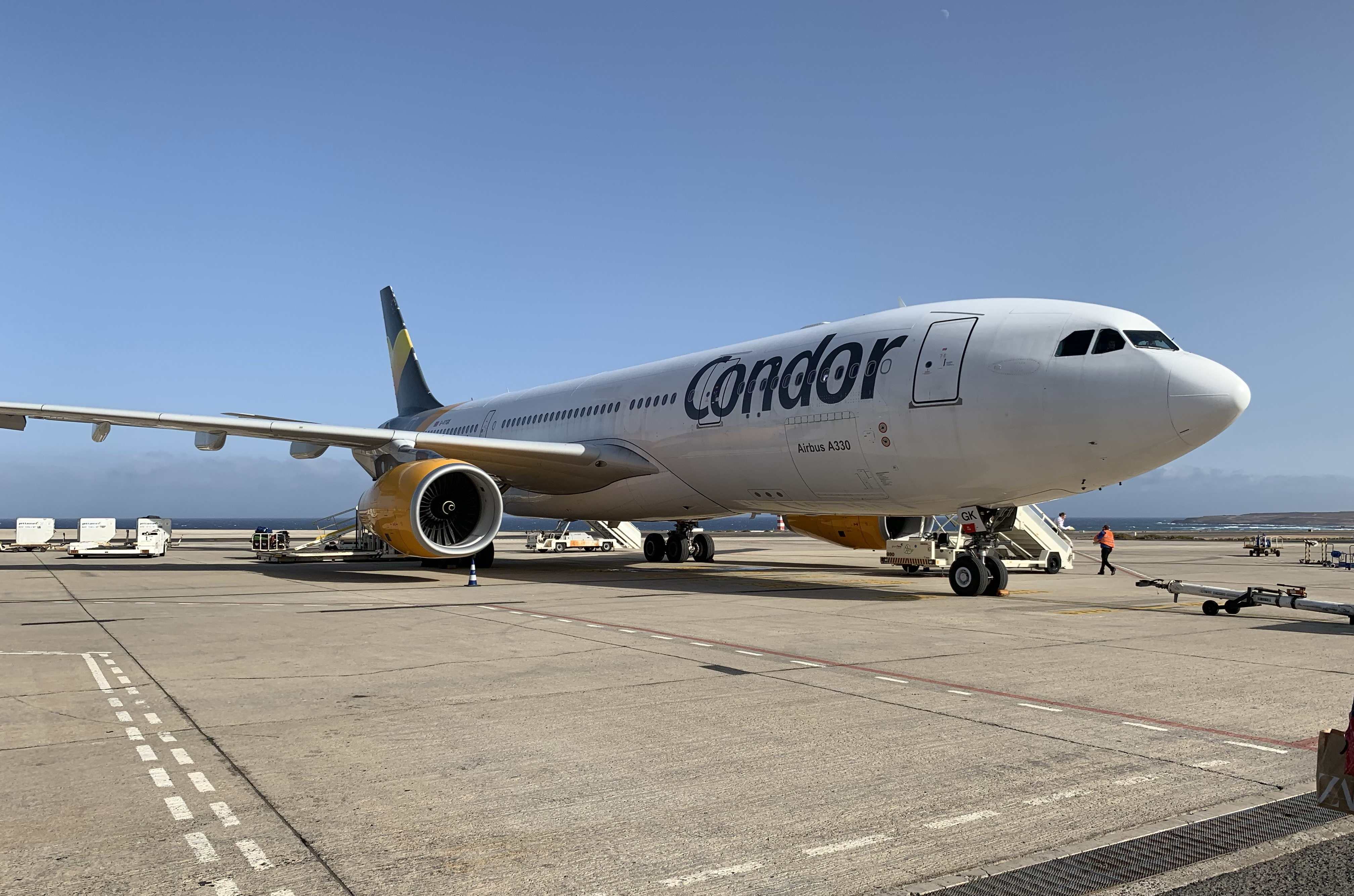 Airbus A330-200 (G-VYGK) der Condor